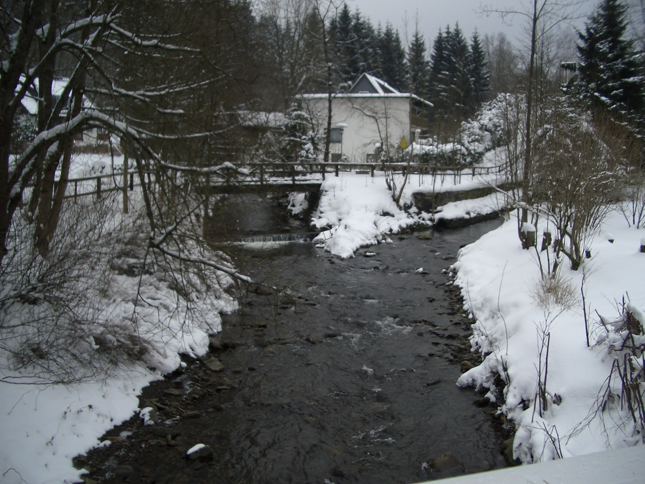 Vereinigung von Oker (links) und Gerlachsbach (rechts) zur Oker in Altenau (an der "Grüne Insel")